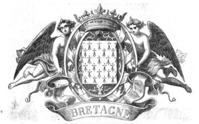 Ecusson arriere de La Bretagne